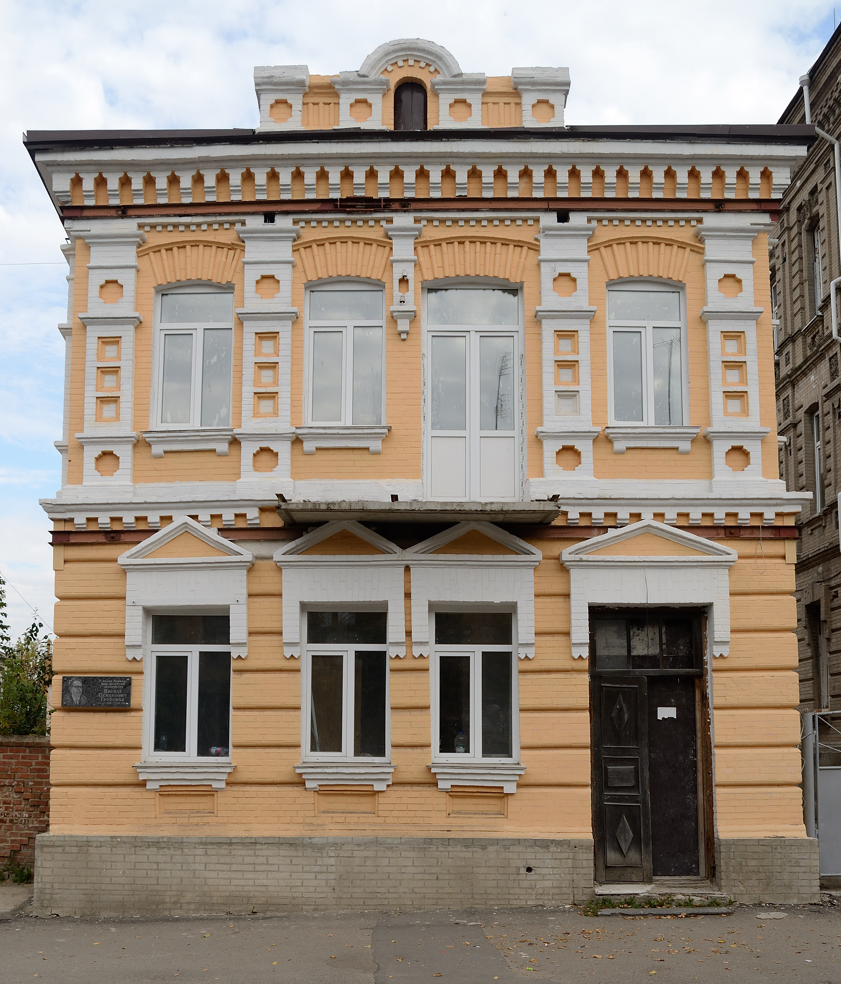 Особняк В. С. Гроссмана, Бердичів, вул. Шевченка, 14